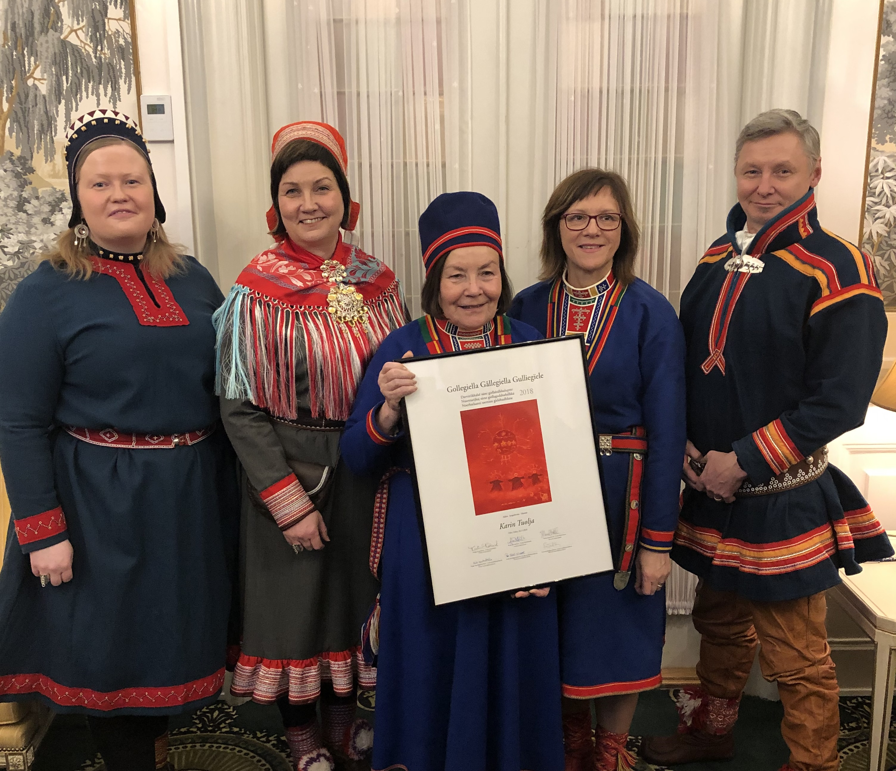 Karin Tuolja fra Jokkmokk i Sverige og Jekaterina Mechkina fra Murmansk i Russland tildeles den nordiske språkprisen Gollegiella for 2018. På bildet: President i Sametinget i Finland Tiina Sanila Aikio, president i Sametinget i Norge Aili Keskitalo, vinner Karin Tuolja, jurymedlem fra norsk side Solvår Knutsen Turi, president i Sametinget i Sverige Per-Olof Nutti Foto: Eirik Larsen/Sámediggi